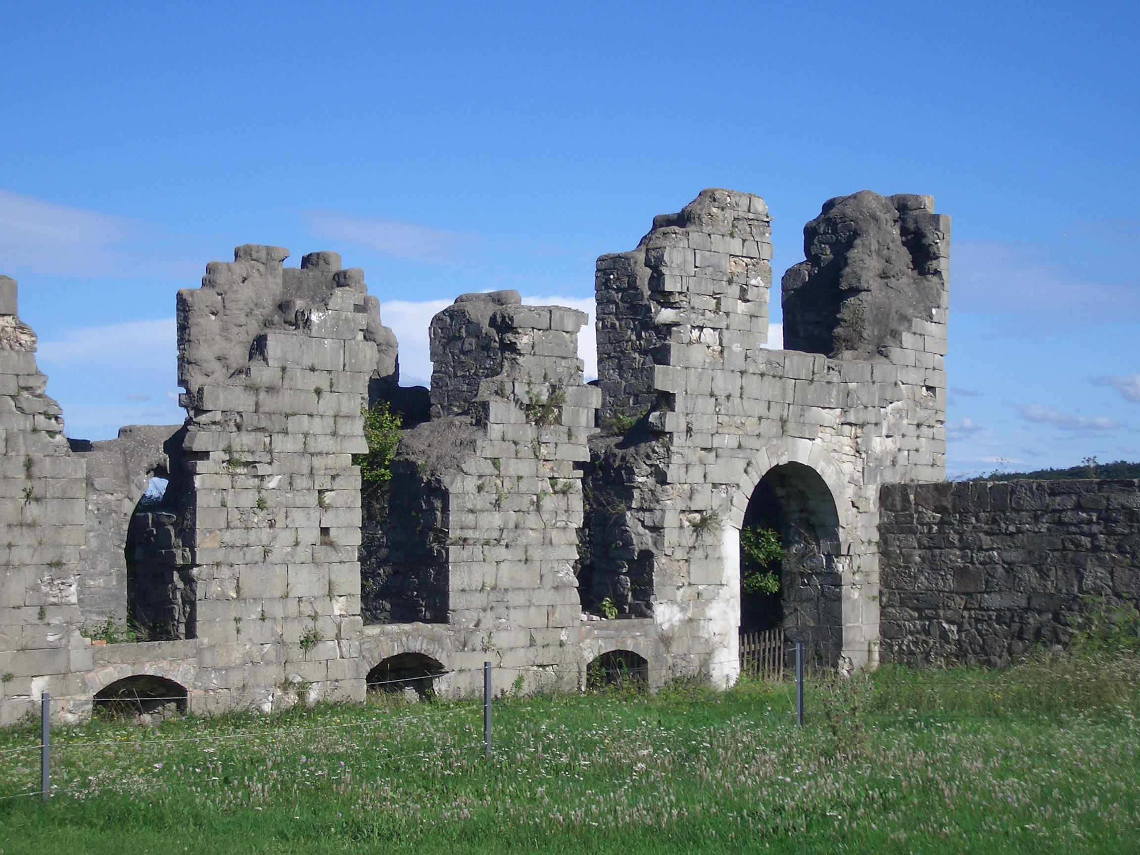 Festung Rothenberg bei Schnaittach in der Fränkischen Alb. Blick vom Innenhof nach Nordosten auf das Ende des Ostflügels des Zeughauses.